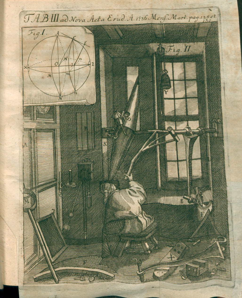 Illustration